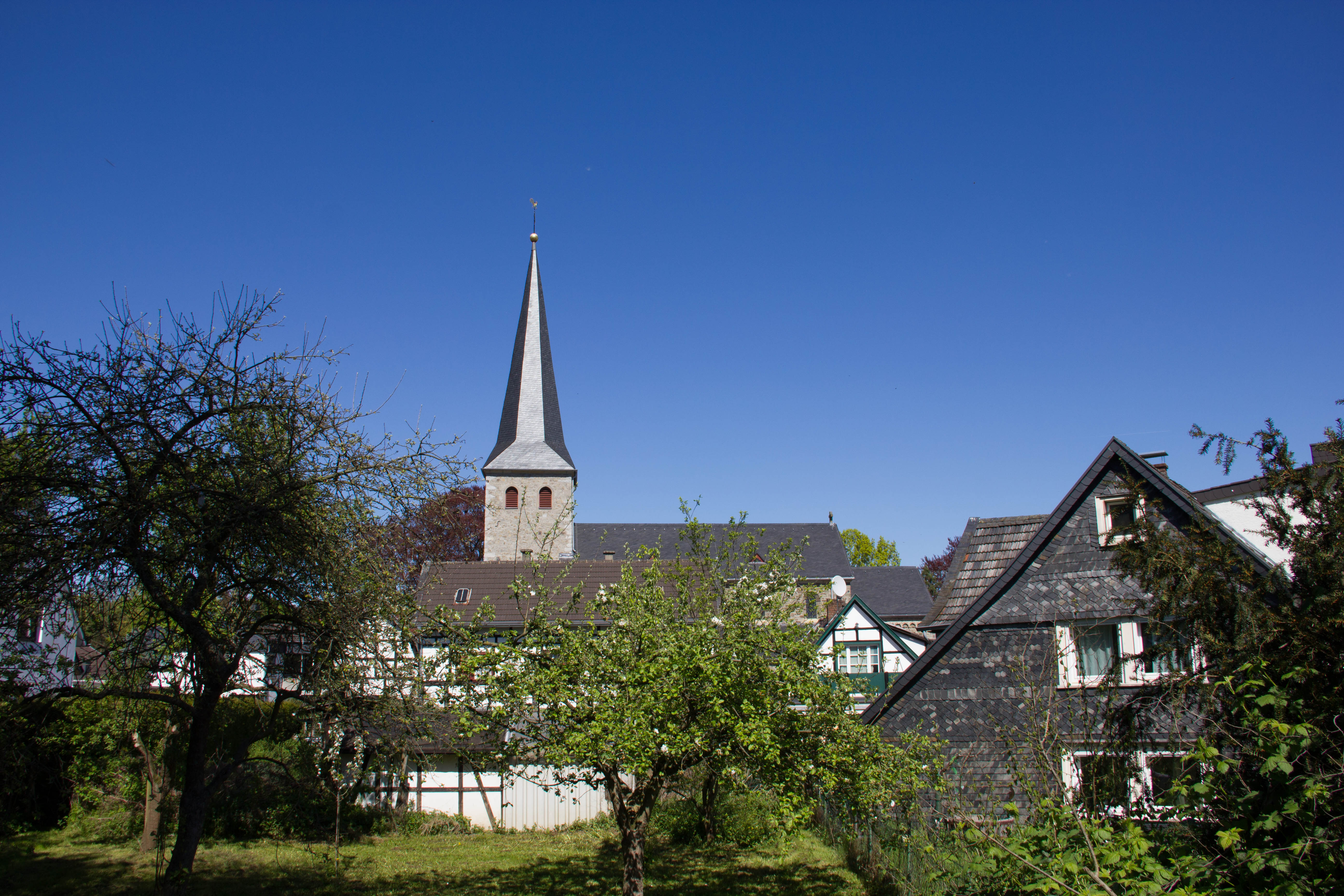 Pfarrkirche Sankt Johannes Enthauptung hinter Fachwerkhäusern in Alt - Lohmar